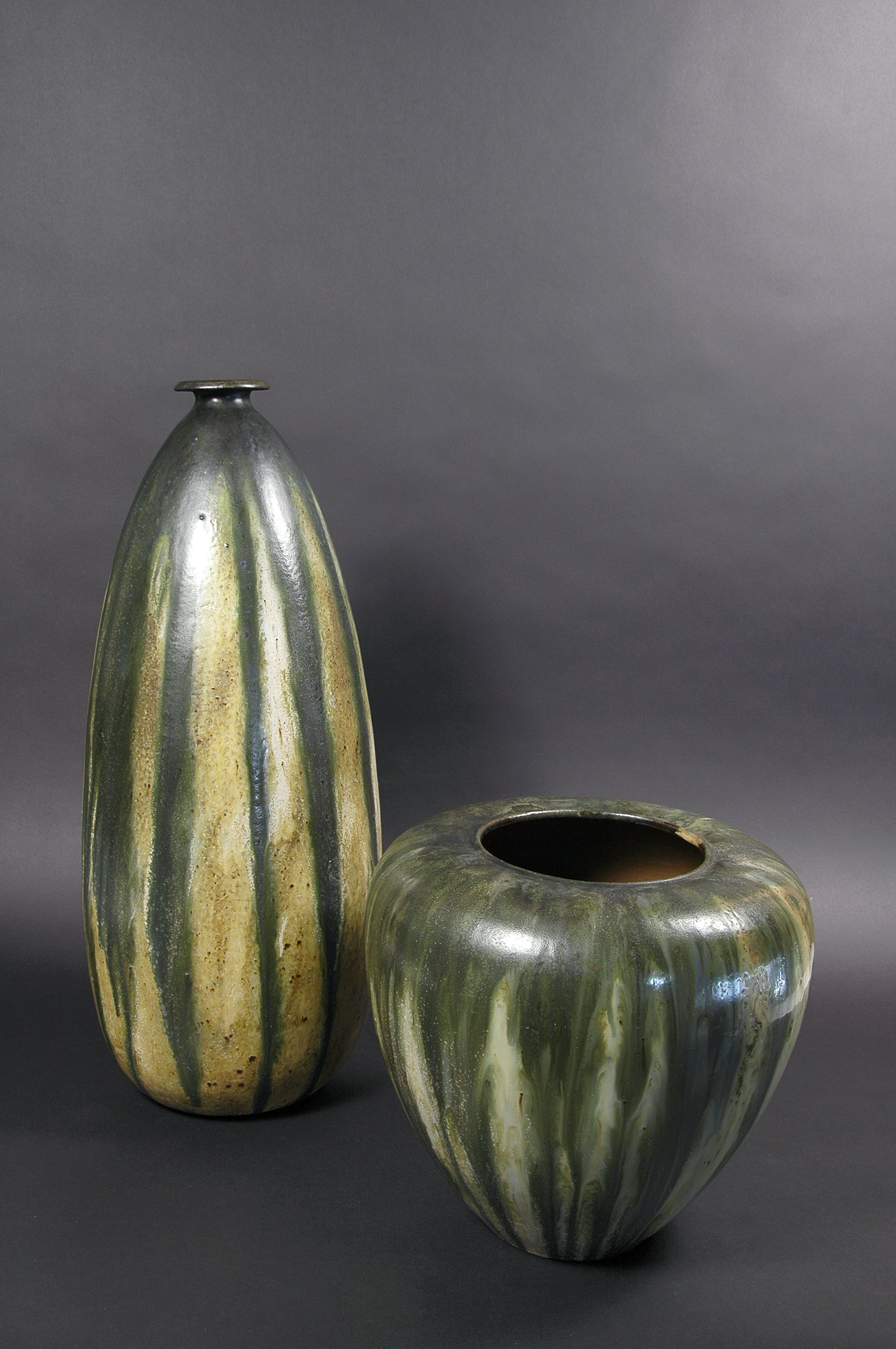 Grès salés grand feu © Le Clockarium